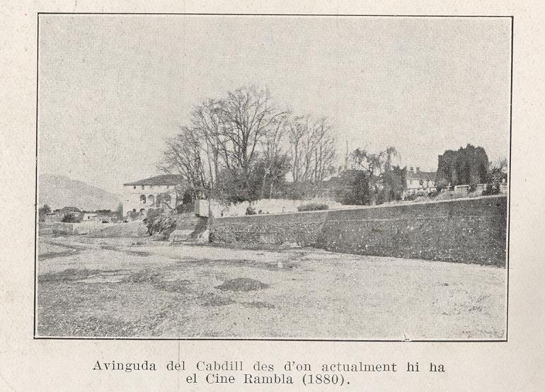 Catalunya, Terrassa, Avinguda Cabdill, el 1890.